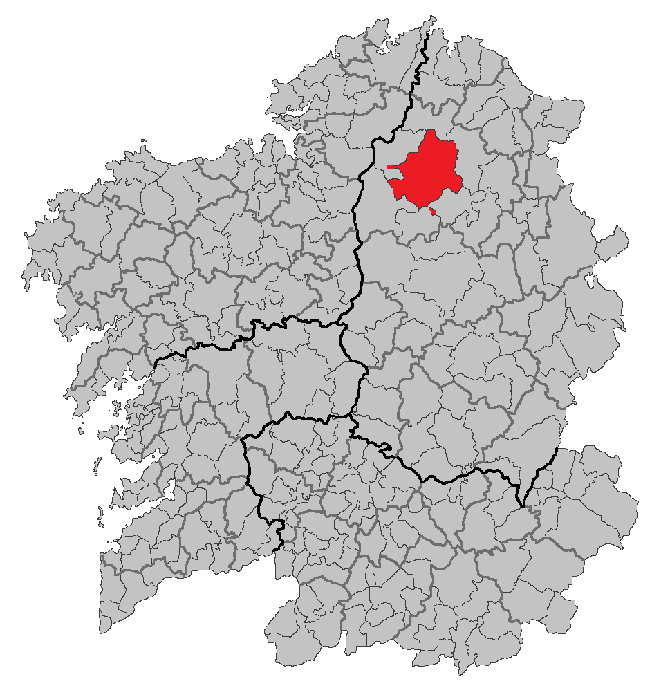 Mapa coa localización do concello de Vilalba.